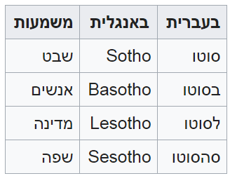 טבלת הטיות סוטו